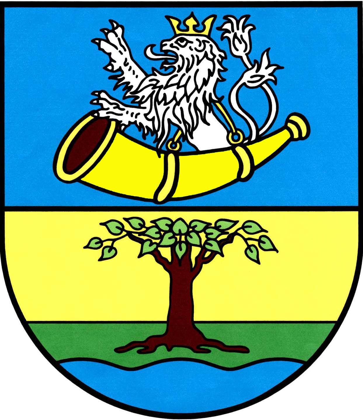 Znak obce Veltruby